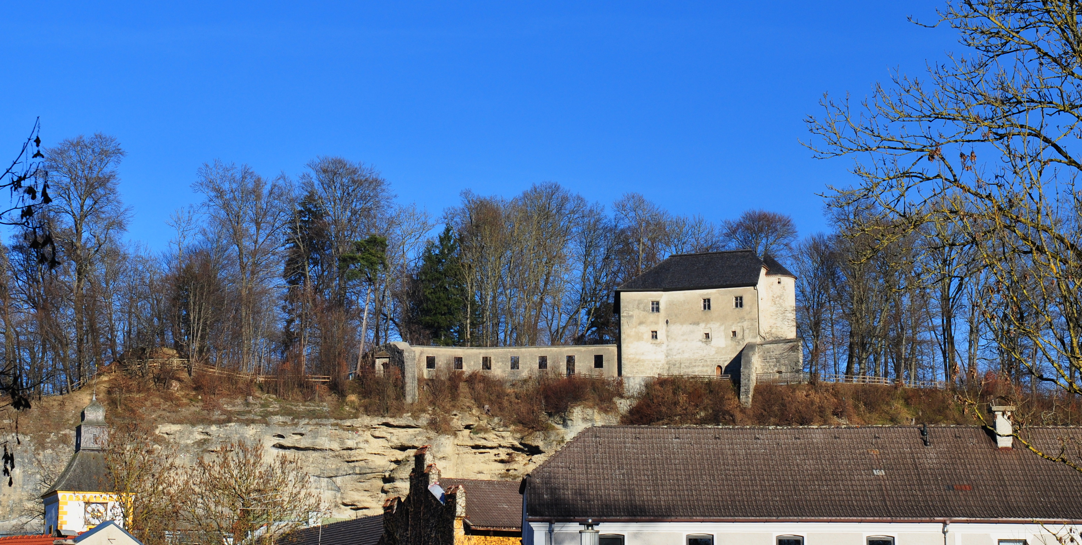 Hochschloss (Obere Burg)- Stein an der Traun